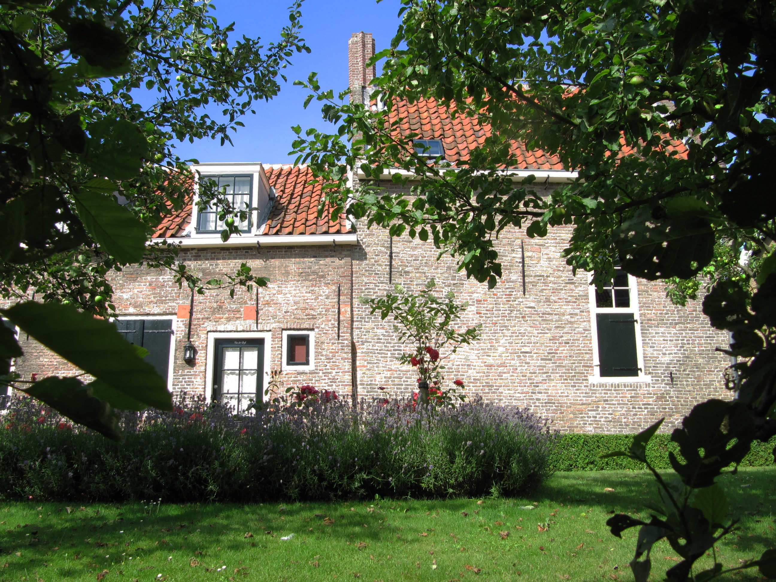 Maasland - Commandeurshof 1.jpg, rijksmonument